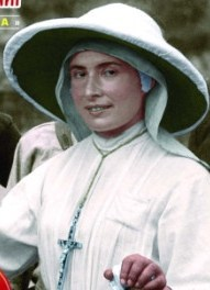 Bienheureuse Irène Stefani (1891-1930).